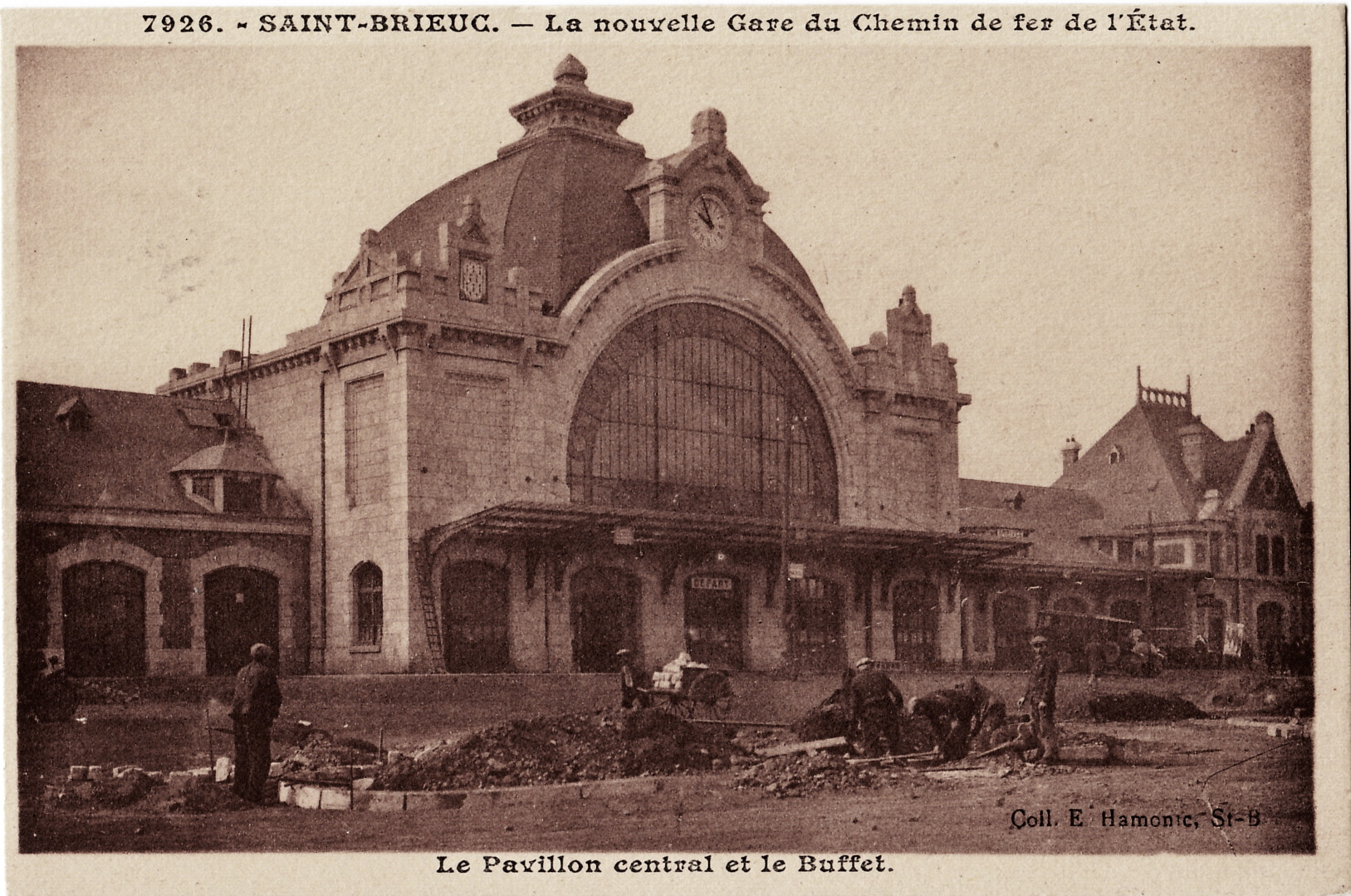 Carte postale ancienne éditée par Hamonic à Saint-Brieuc, n°7926 :SAINT-BRIEUC - La nouvelle Gare du Chemin de fer de l'Etat